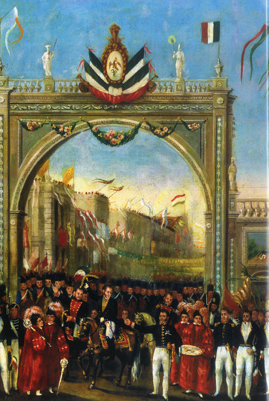 Anónimo, Solemne y pacífica entrada del Ejército de las Tres Garantías a la Ciudad de México (detalle). Imagen tomada del libro: Guadalupe Jiménez Codinach, México. Los proyectos de una nación. 1821-1888, México, Fomento Cultural Banamex, 2001, p. 72.